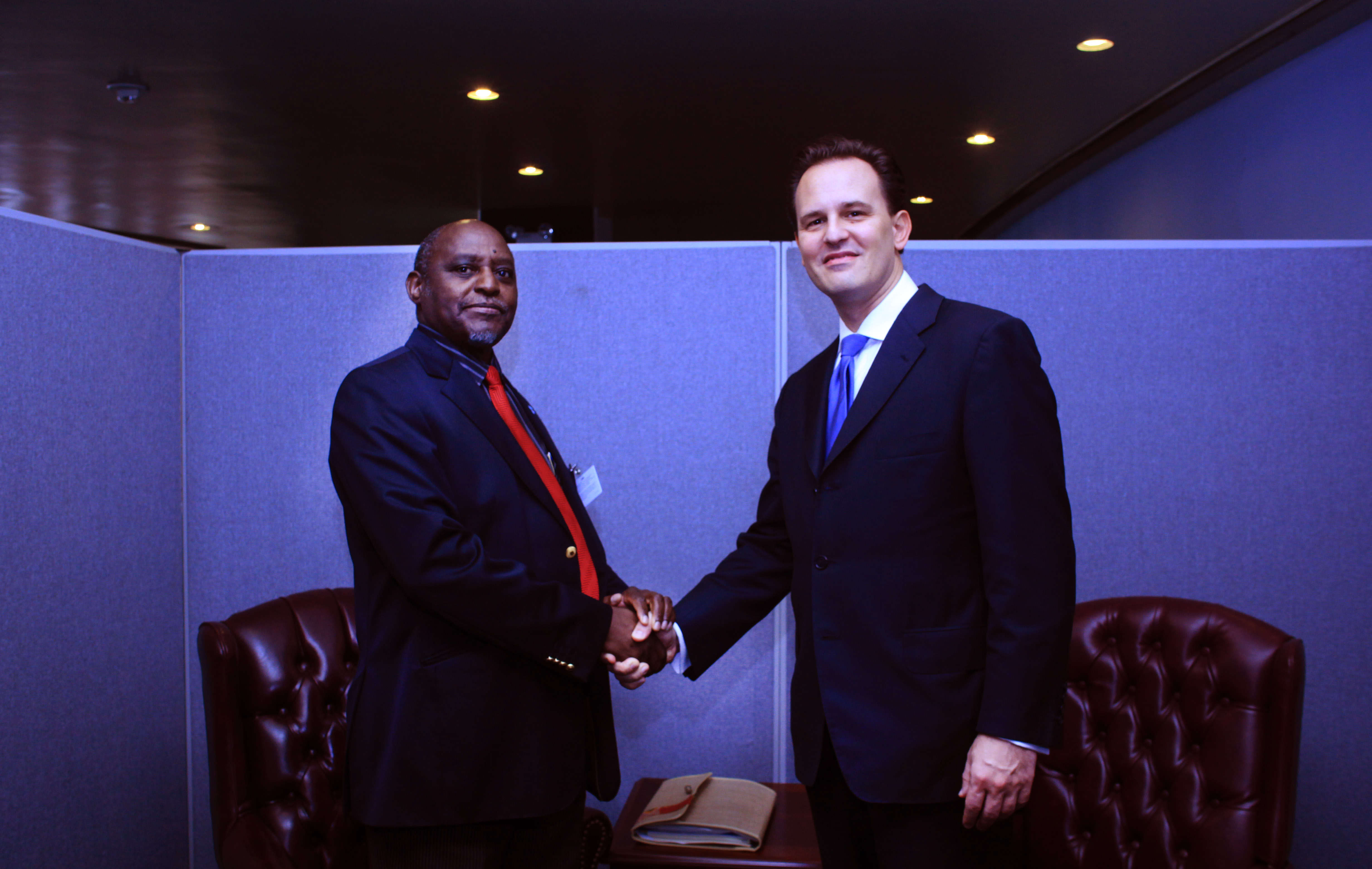 Συνάντηση ΥΠΕΞ κ. Δ. Δρούτσα με ΥΠΕΞ Μποτσουάνας Phandu Tombola Chana Skelemani